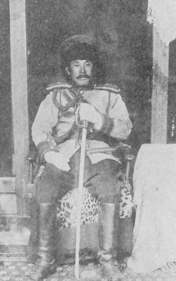 An explorer from Japan,矢島保治郎（Yasujiro Yajima）